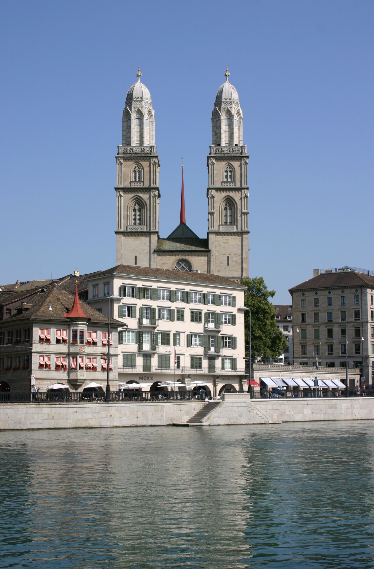 Grossmünster / Großmünster in Zürich, Schweiz, Grossmuenster in Zurich, Switzerland